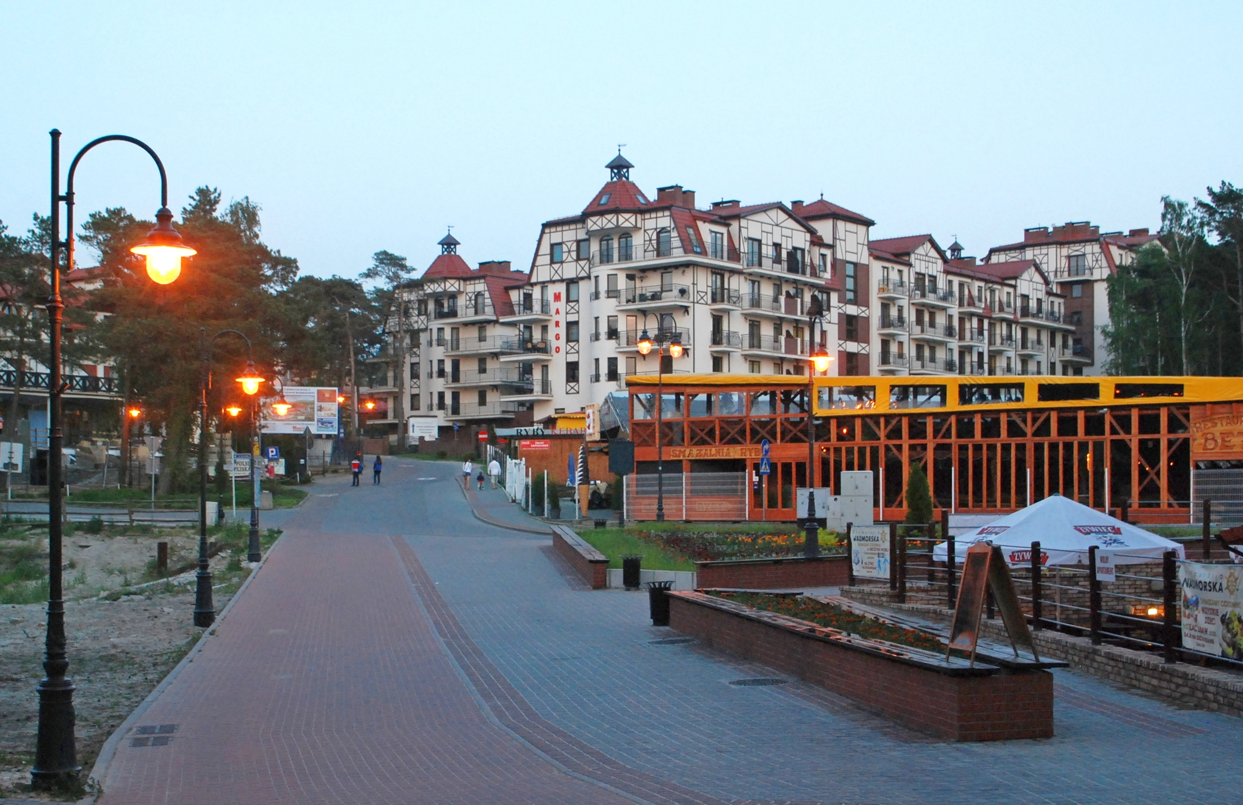 miasto Krynica Morska